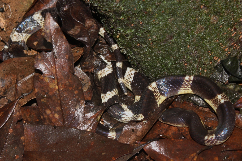 Taken at Tai Mo Shan.